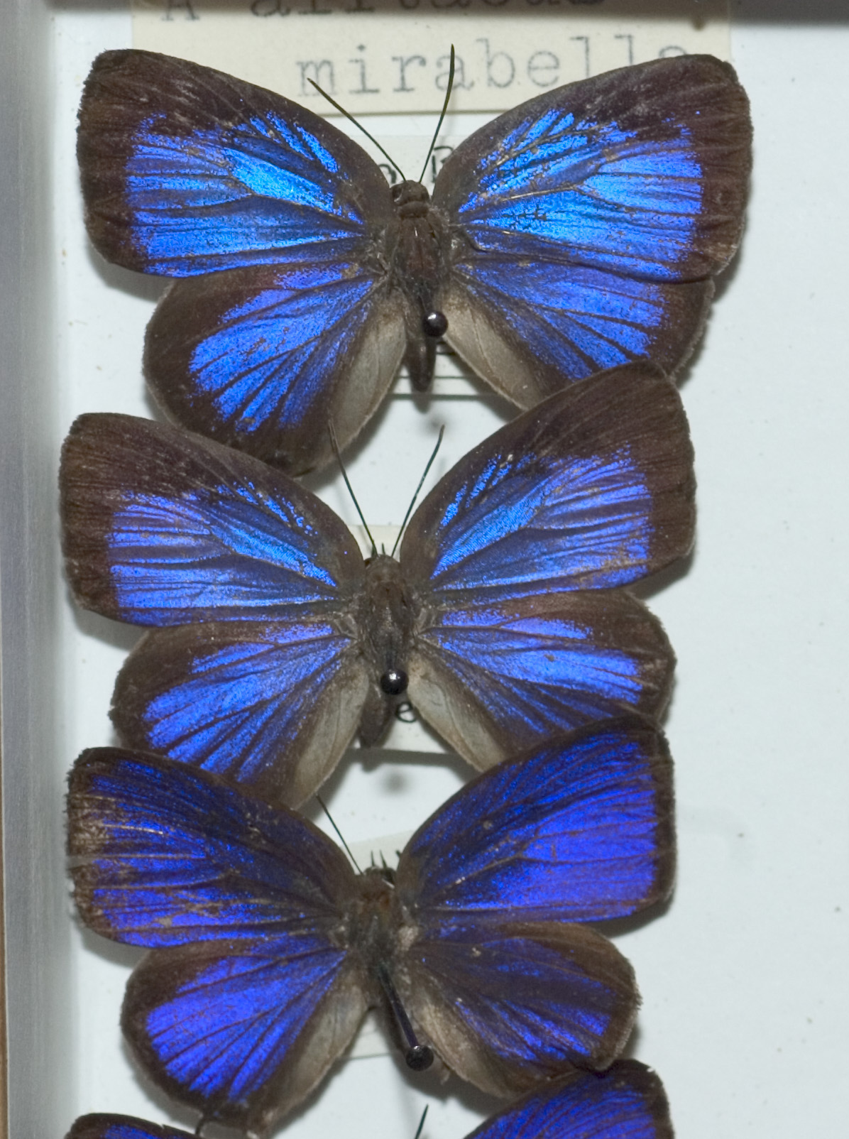 Arhopala alitaeus mirabella Doherty,1889 J. asiat. Soc. Bengal, Pt.2 58(4):420, pl.23, fig.2.